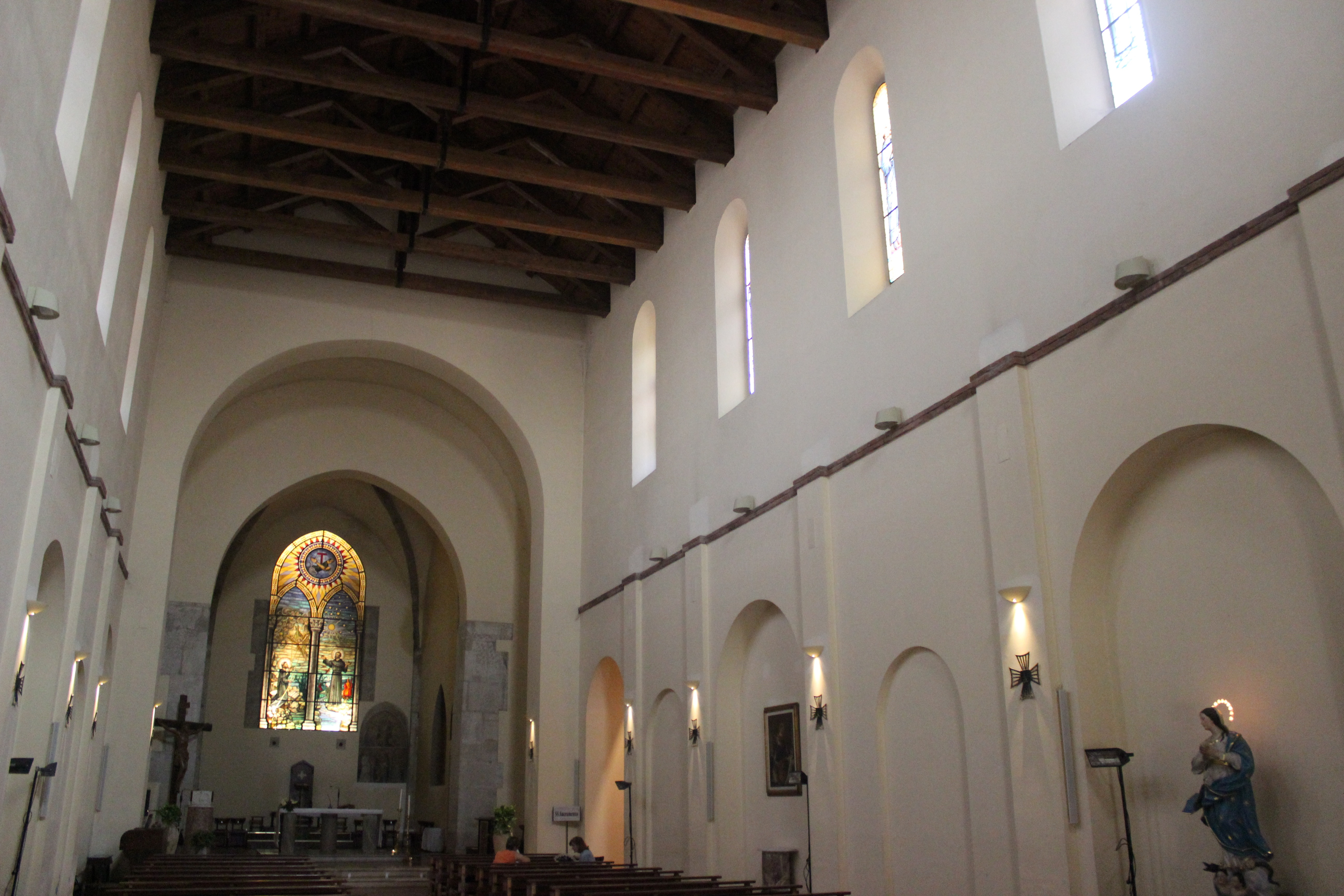 Benevento. San Francesco, interior.